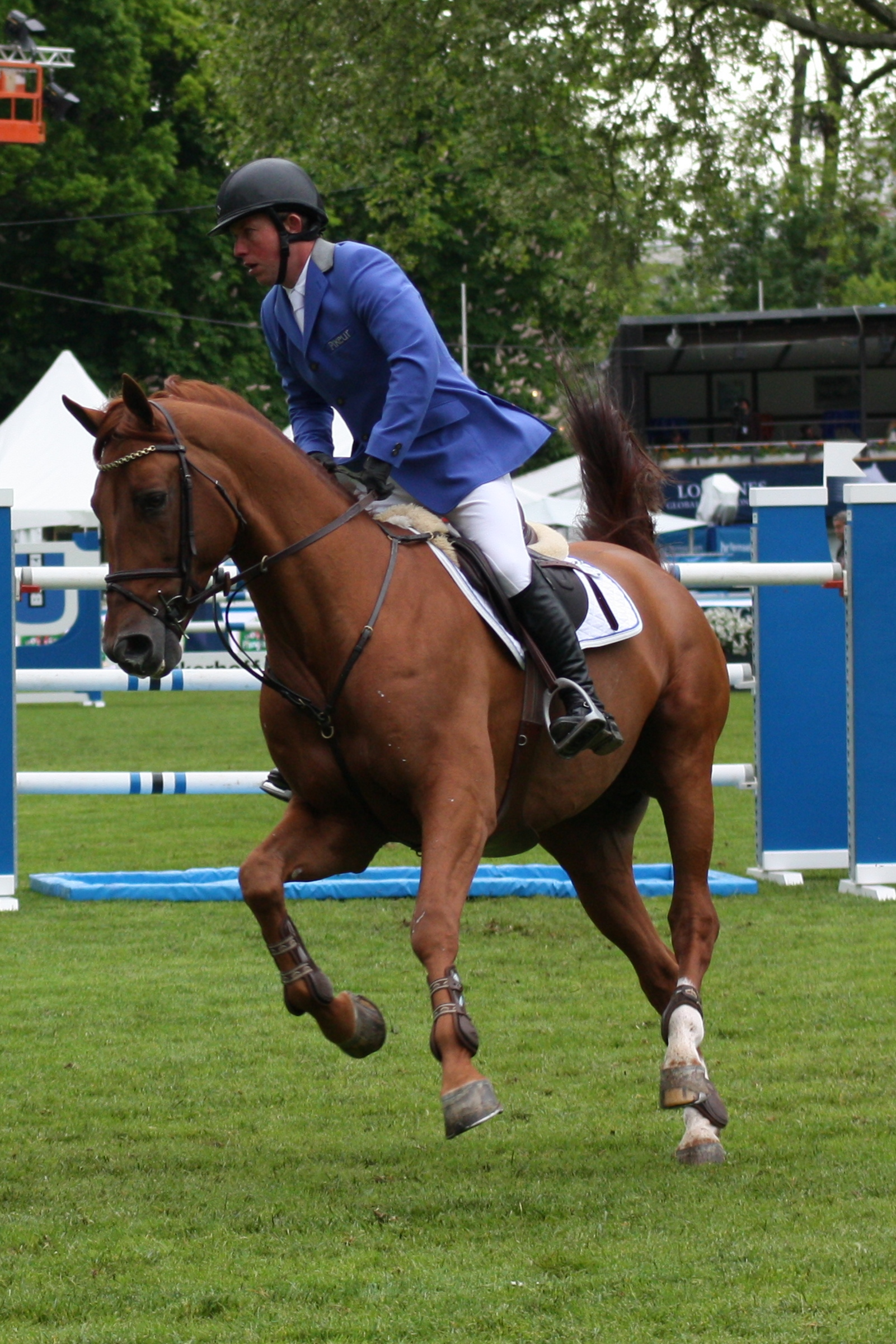 77. Internationanles Wiesbadener Pfingstunier 2013, CSI***** Eröffnungsspringen, Gerco Schröder auf London Personality rights warning Although this work is freely licensed or in the public domain, the person(s) shown may have rights that legally restrict certain re-uses unless those depicted consent to such uses. In these cases, a model release or other evidence of consent could protect you from infringement claims.